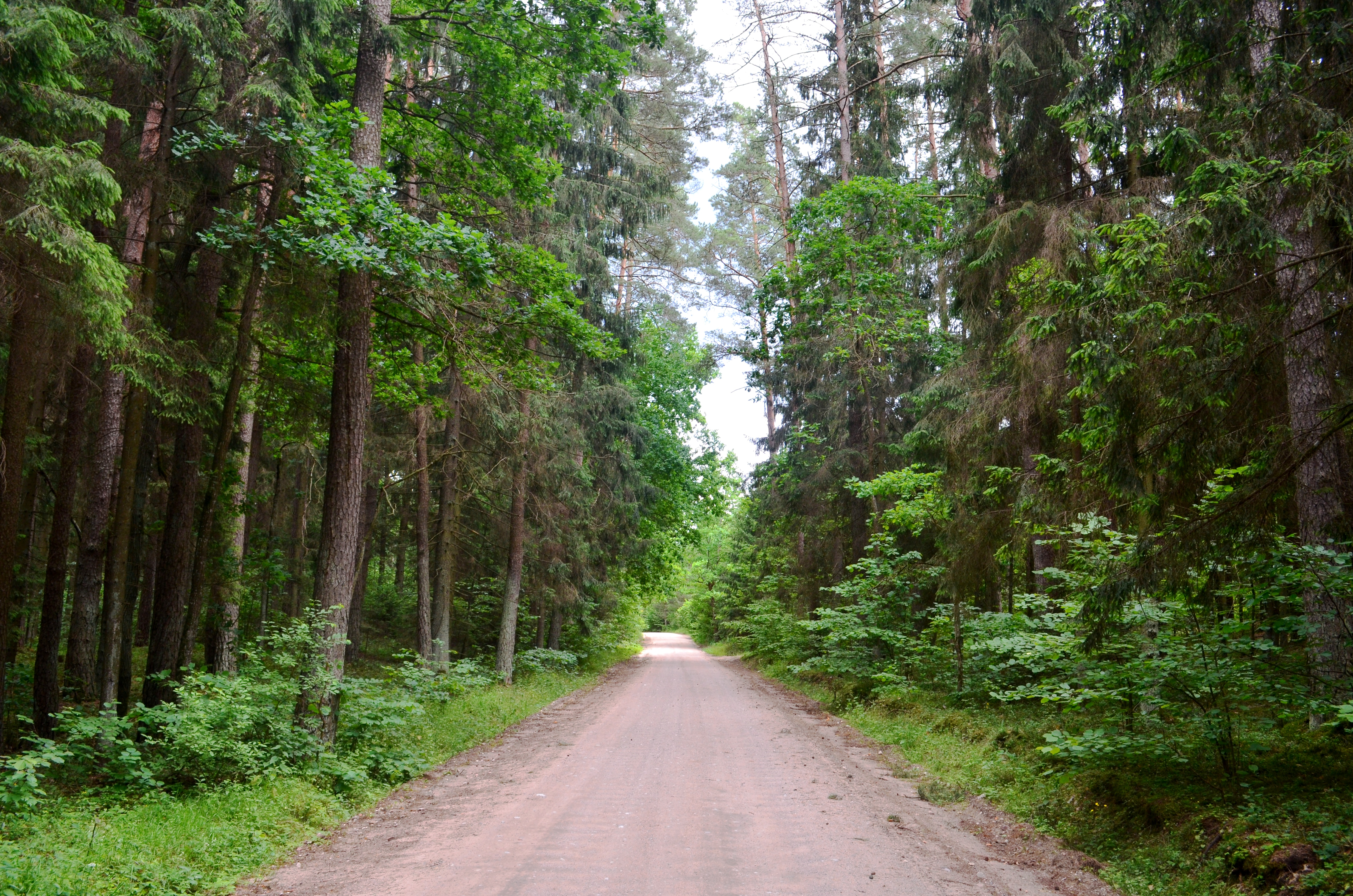 Sudvajų miškas, Alytaus raj.